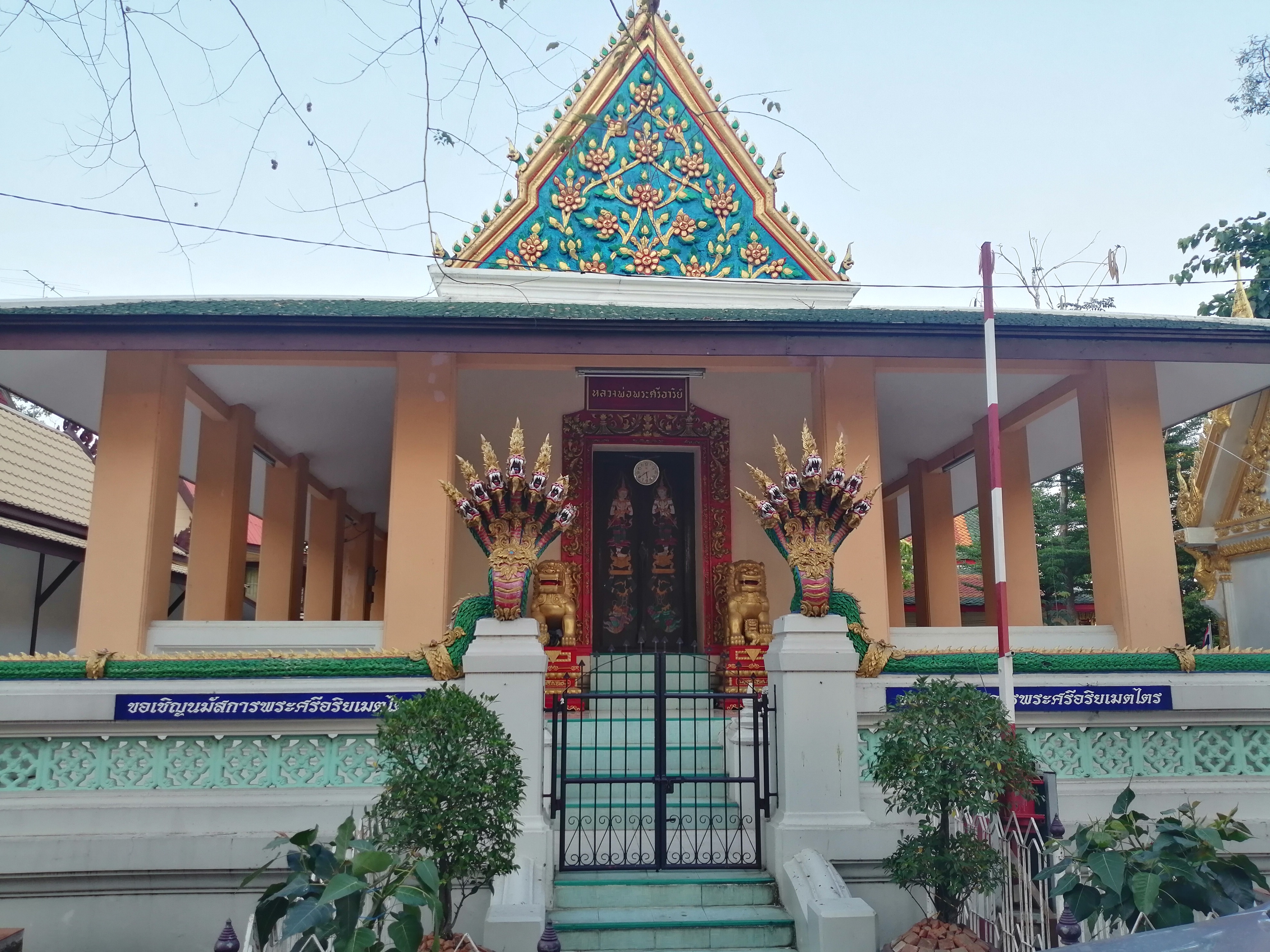 วิหารพระศรีอาริย์ (หอไตร)